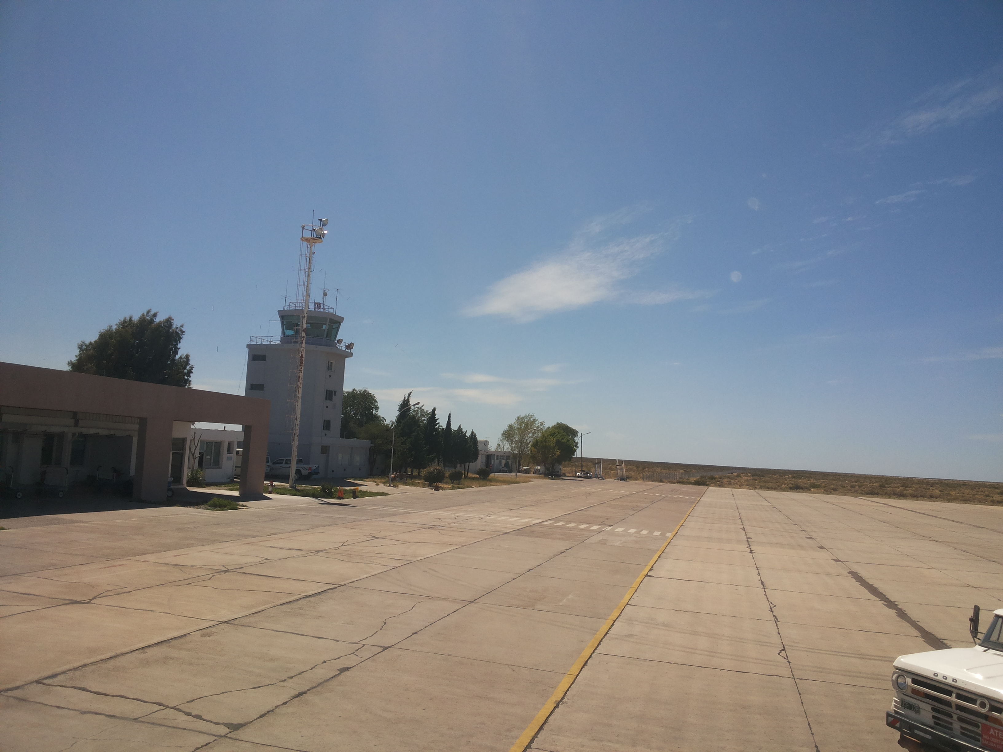 Aeropuerto de Trelew